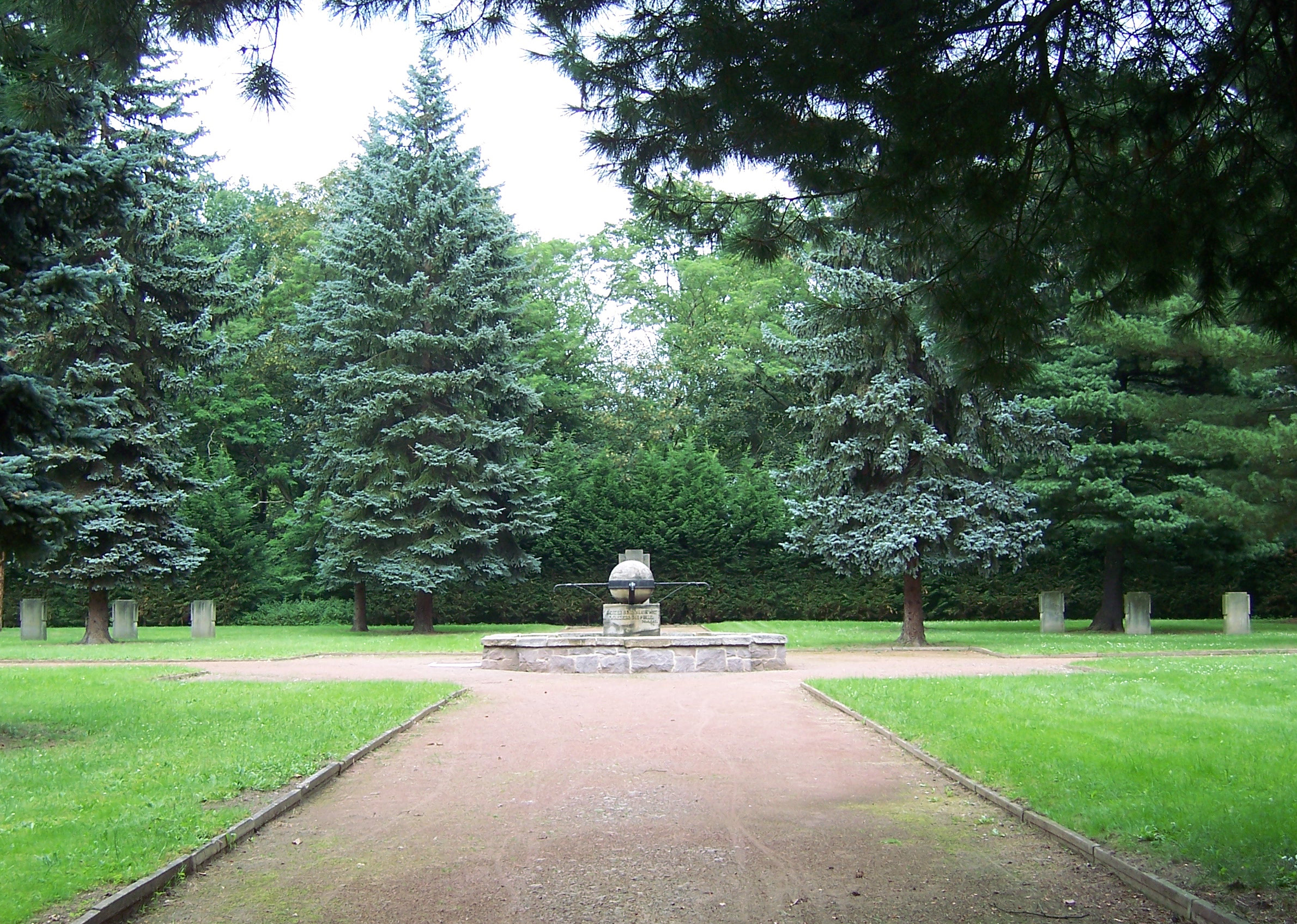 Gedenkstätte auf dem Johannisfriedhof Dresden für mehr als 3700 Tote des Dresdner Luftangriffs am 13. Februar 1945